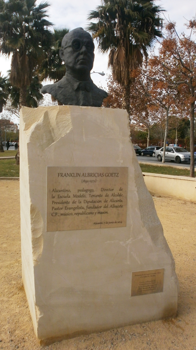 Monumento a Franklin Albricias Goetz, Alicante, España.